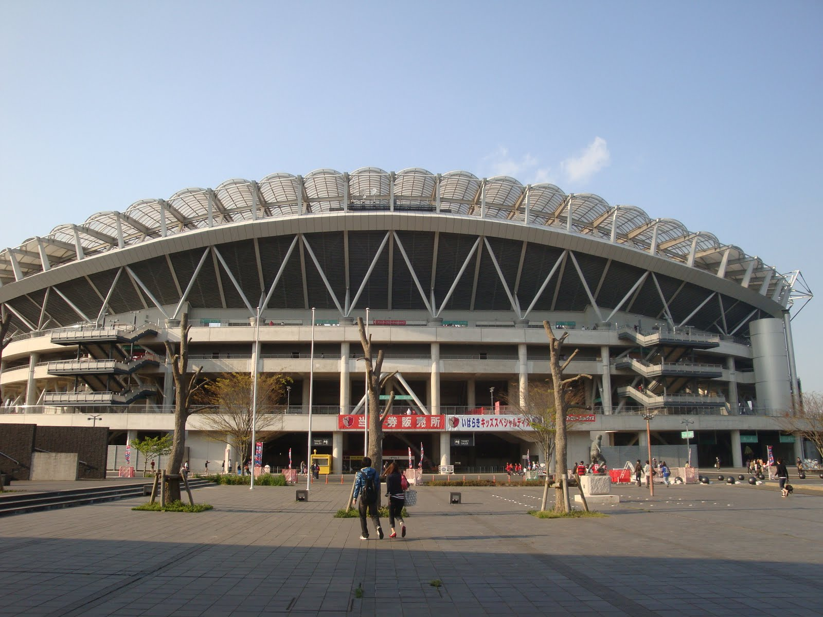 20100501_Kashima Antlers vs Gamba Osaka @Kashima soccer Stadium_001